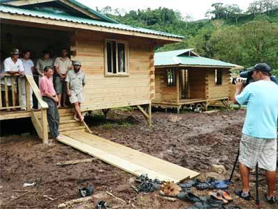 Isla del Coco, cabañas para Guarda parques, en construcción durante el 2010 hechas con voluntarios y la dirección técnica del Arq. Ibo Bonilla